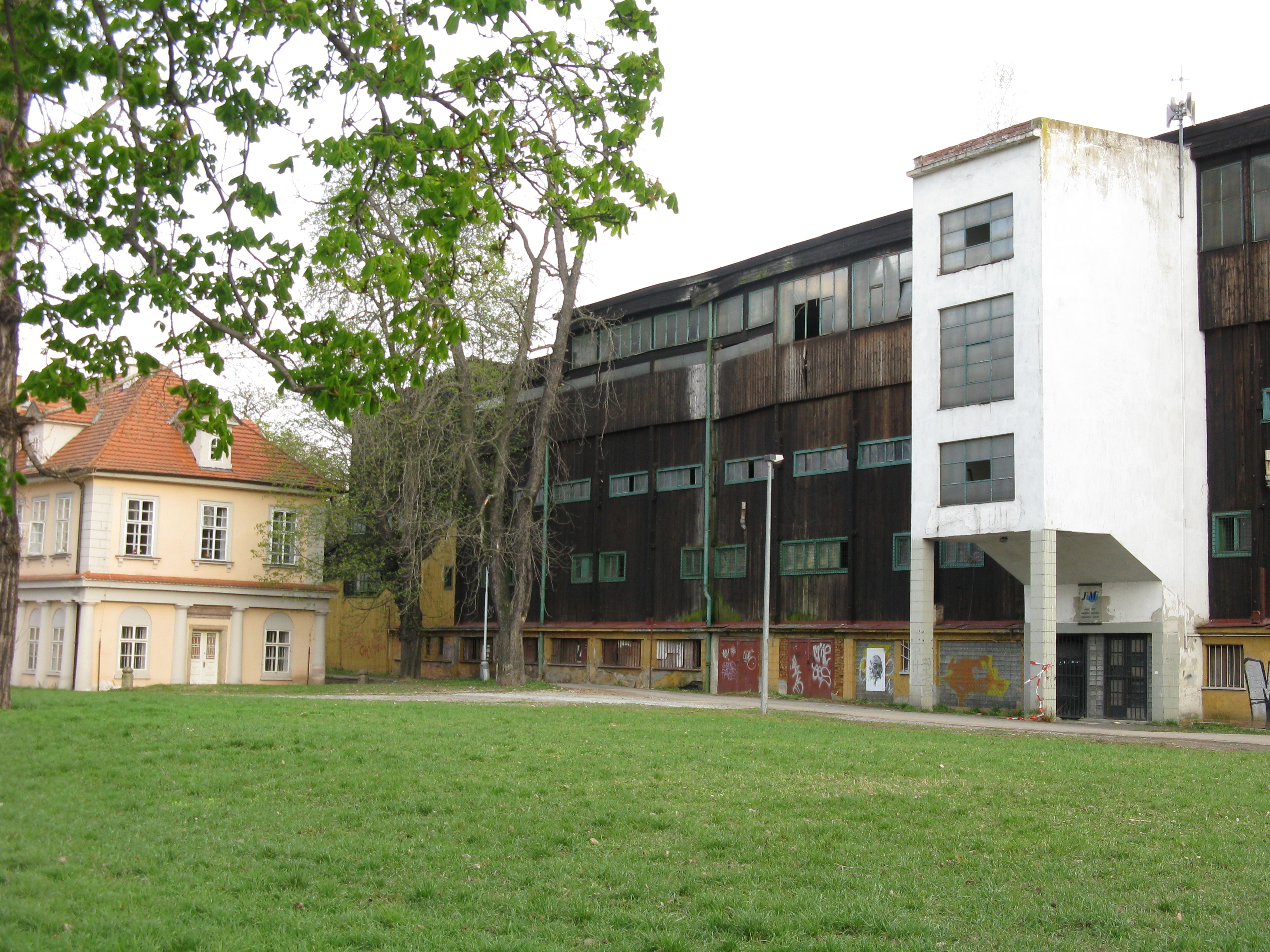 Zimní stadion na Štvanici, pohled z ostrova Štvanice na východní část severní strany. Rovněž je vidět klasicistní dům čp. 858 holešovického katastru.